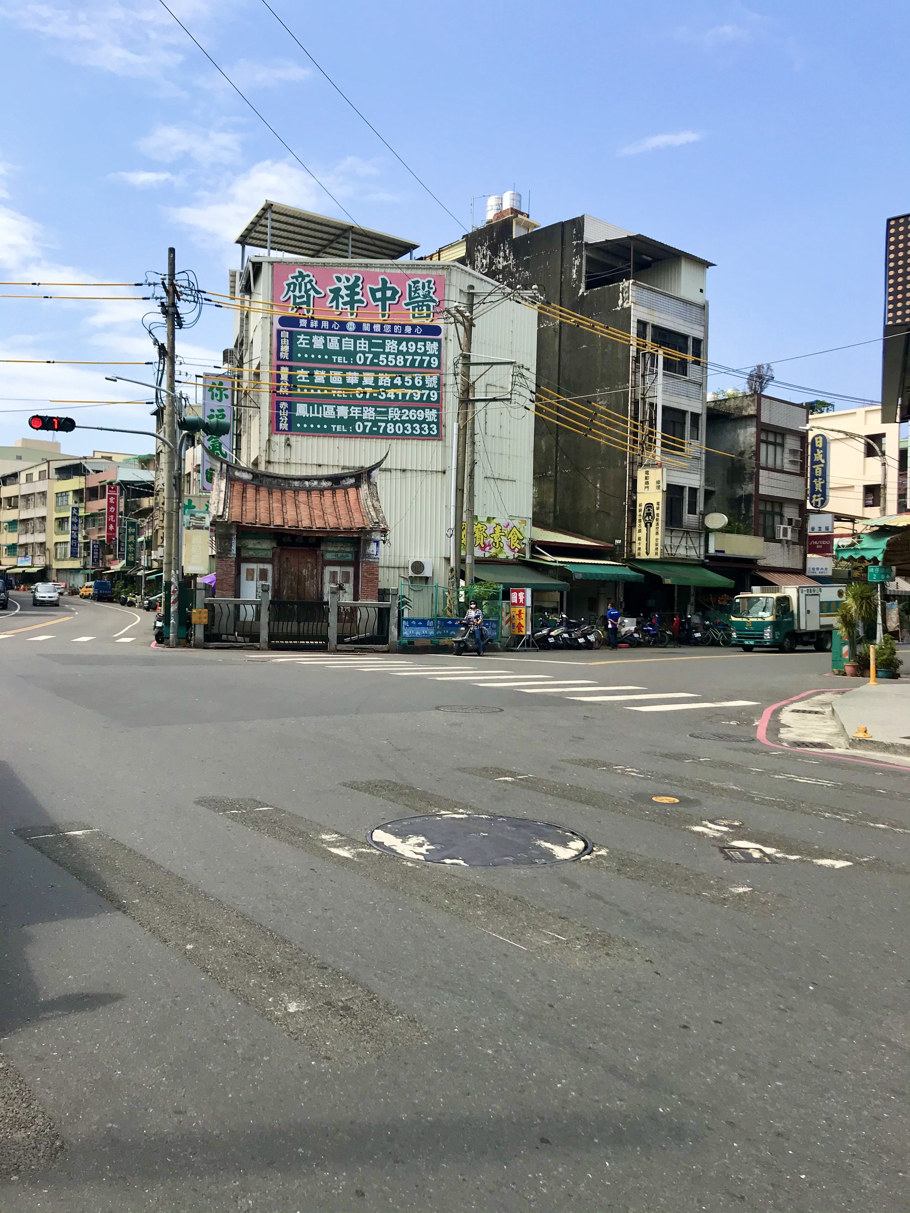 鎮福社與拱辰井